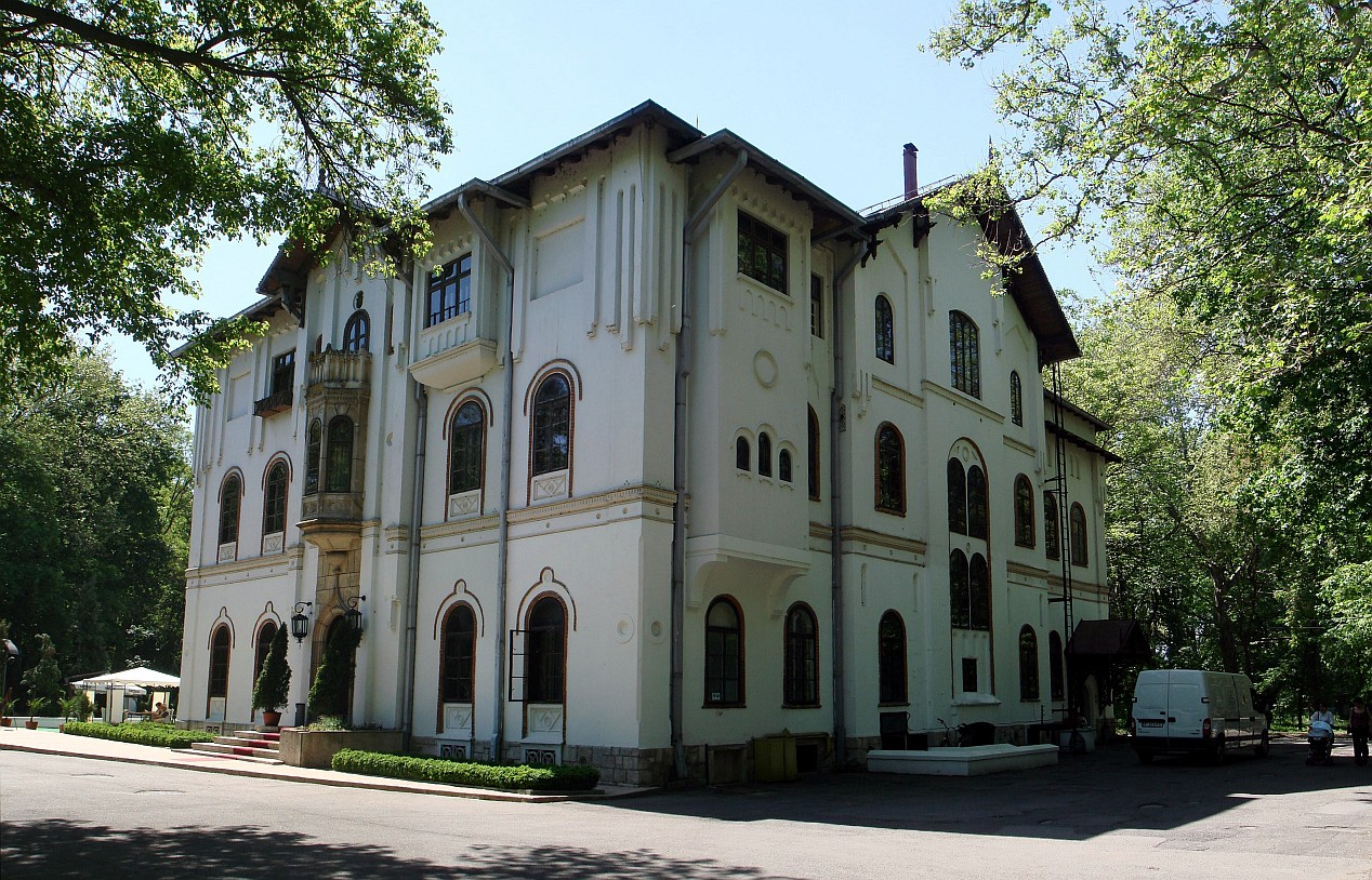 Palatul Știrbei din Buftea 01